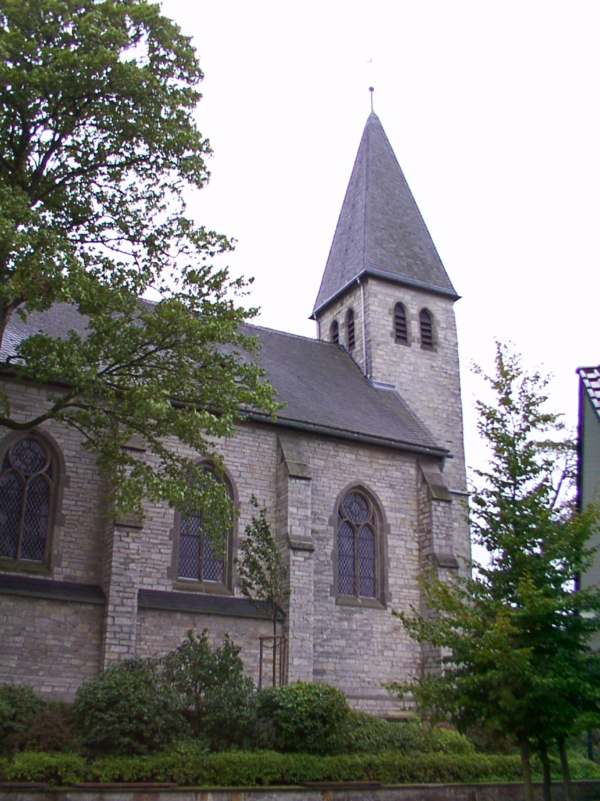 Bad Wünnenberg: Kath. Kirche Sankt Apollonia in Helmern